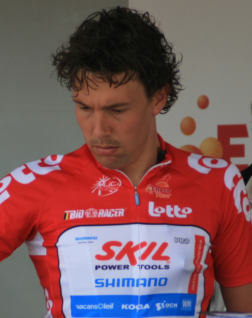 Kenny van Hummel, au départ de la cinquième étape de l'Eneco Tour 2008, à Ardooie